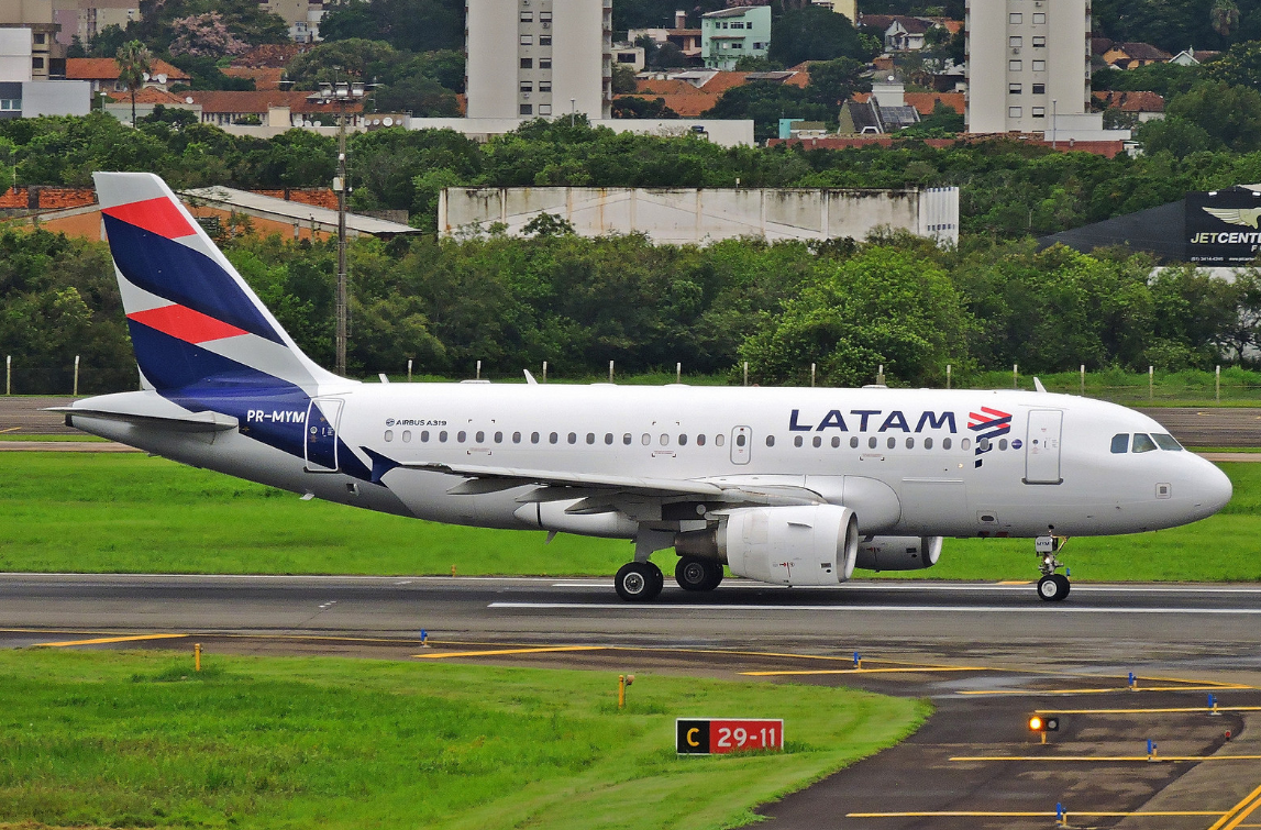 A319 LATAM SBPA